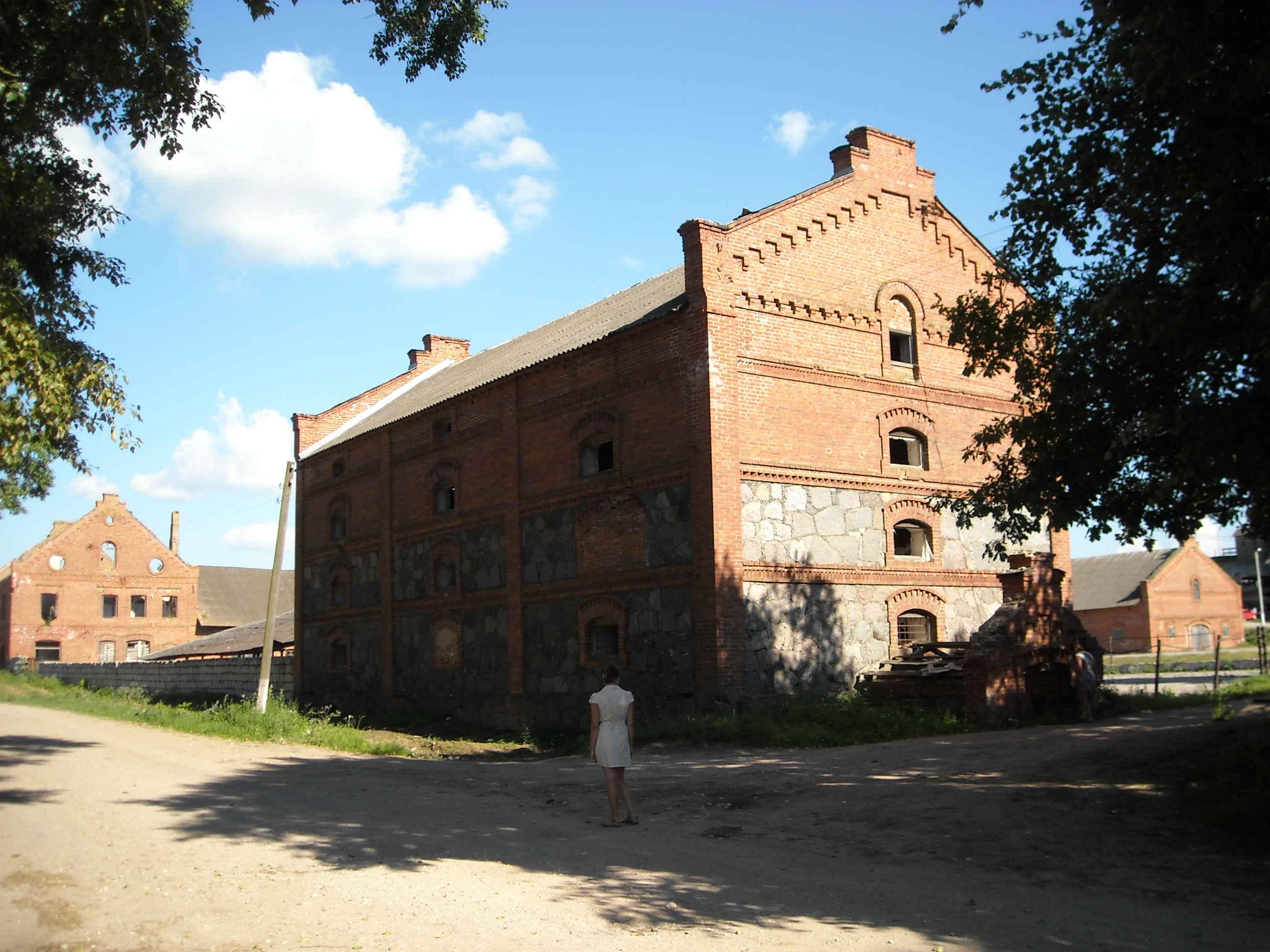 Беларуская (тарашкевіца): Комплекс былой сядзібы «Беліца»: сядзібны дом, вытворчыя і гаспадарчыя пабудовы, парк This is a photo of Belarusian heritage monument. Reference number: 212Г000750 ( WLM)